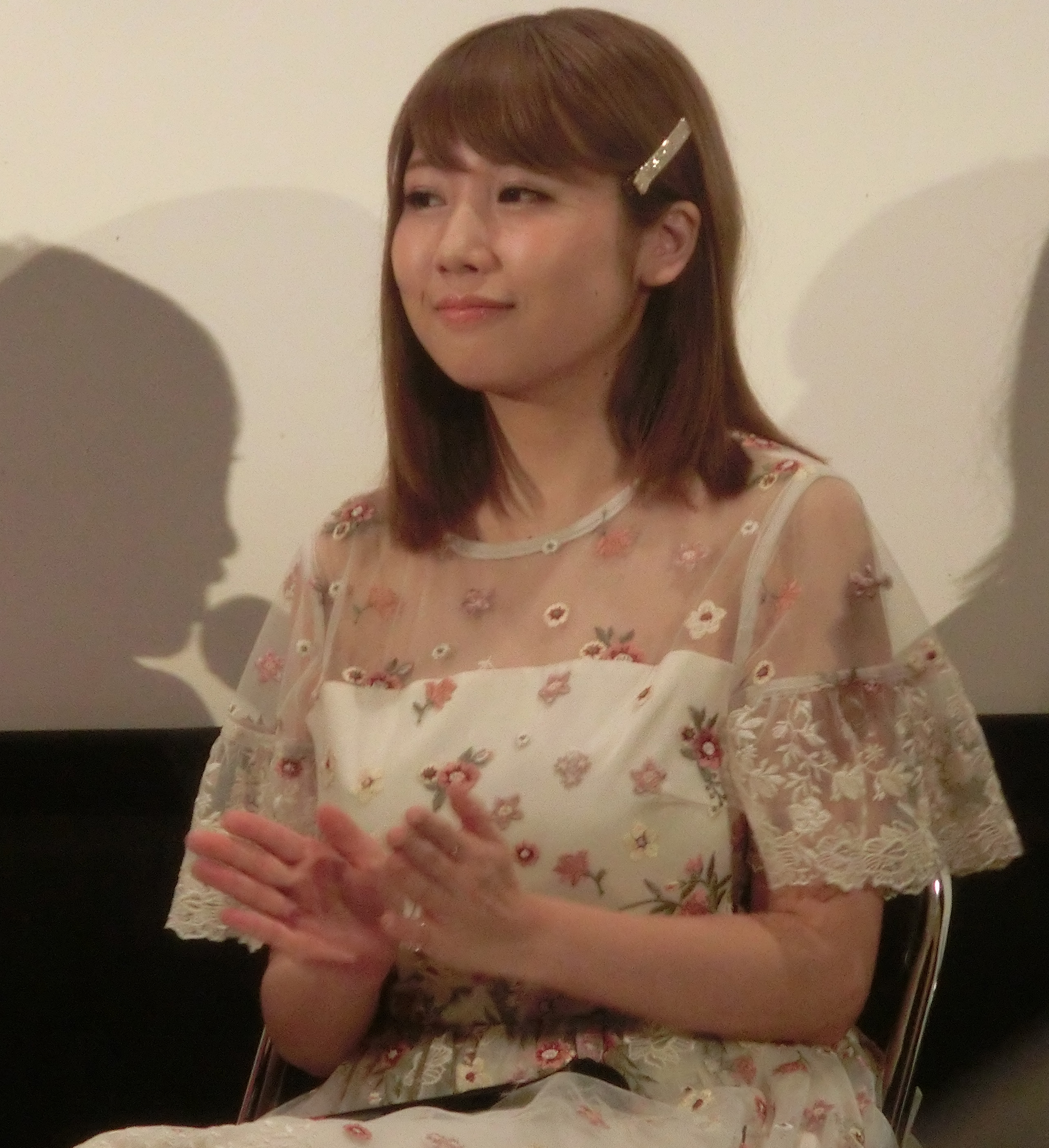 上野オークラ劇場2019年8月10日舞台挨拶